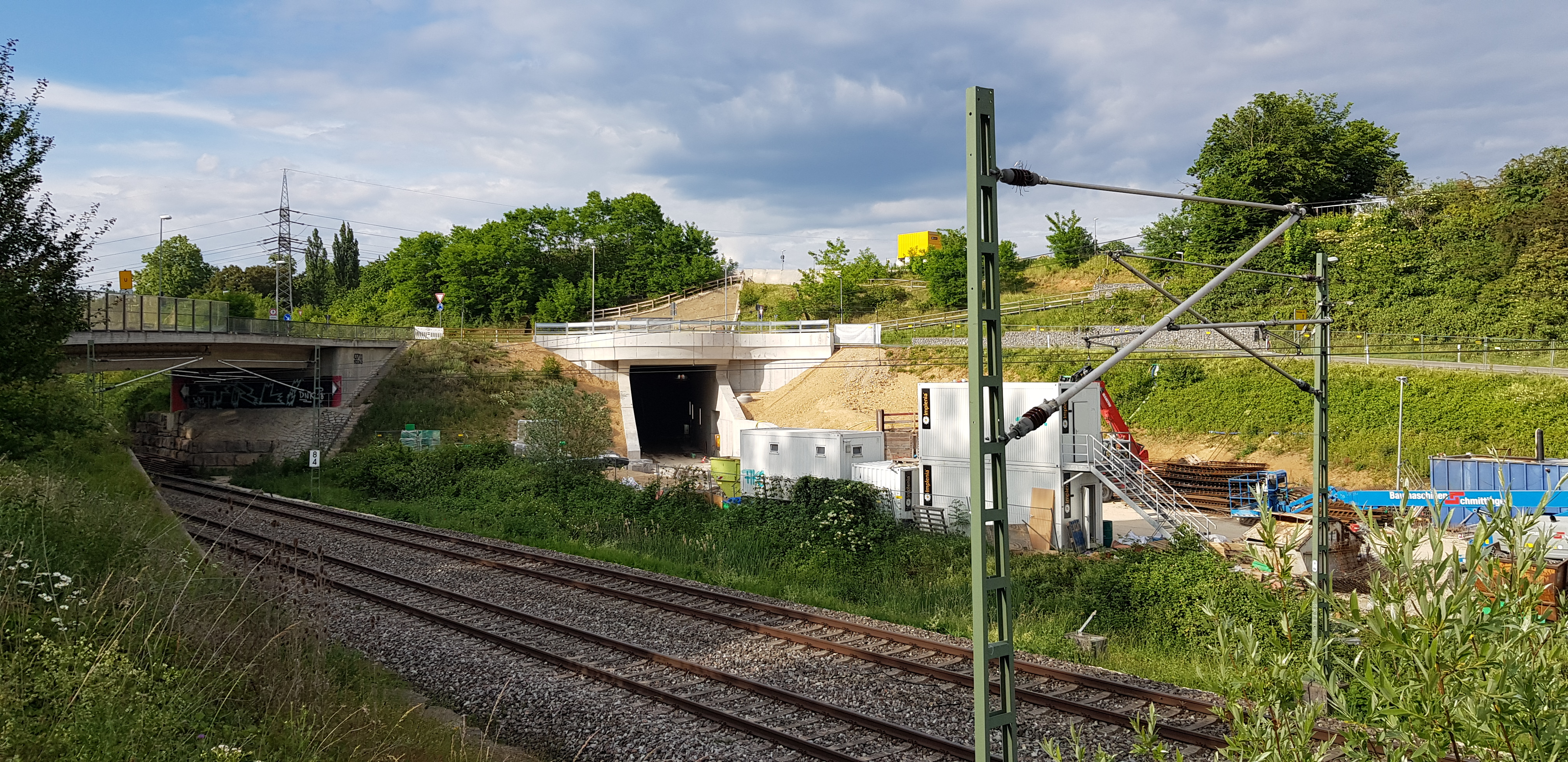 Südportal des Tunnels Wendlinger Kurve mit Baustelleneinrichtungsfläche im Mai 2020.